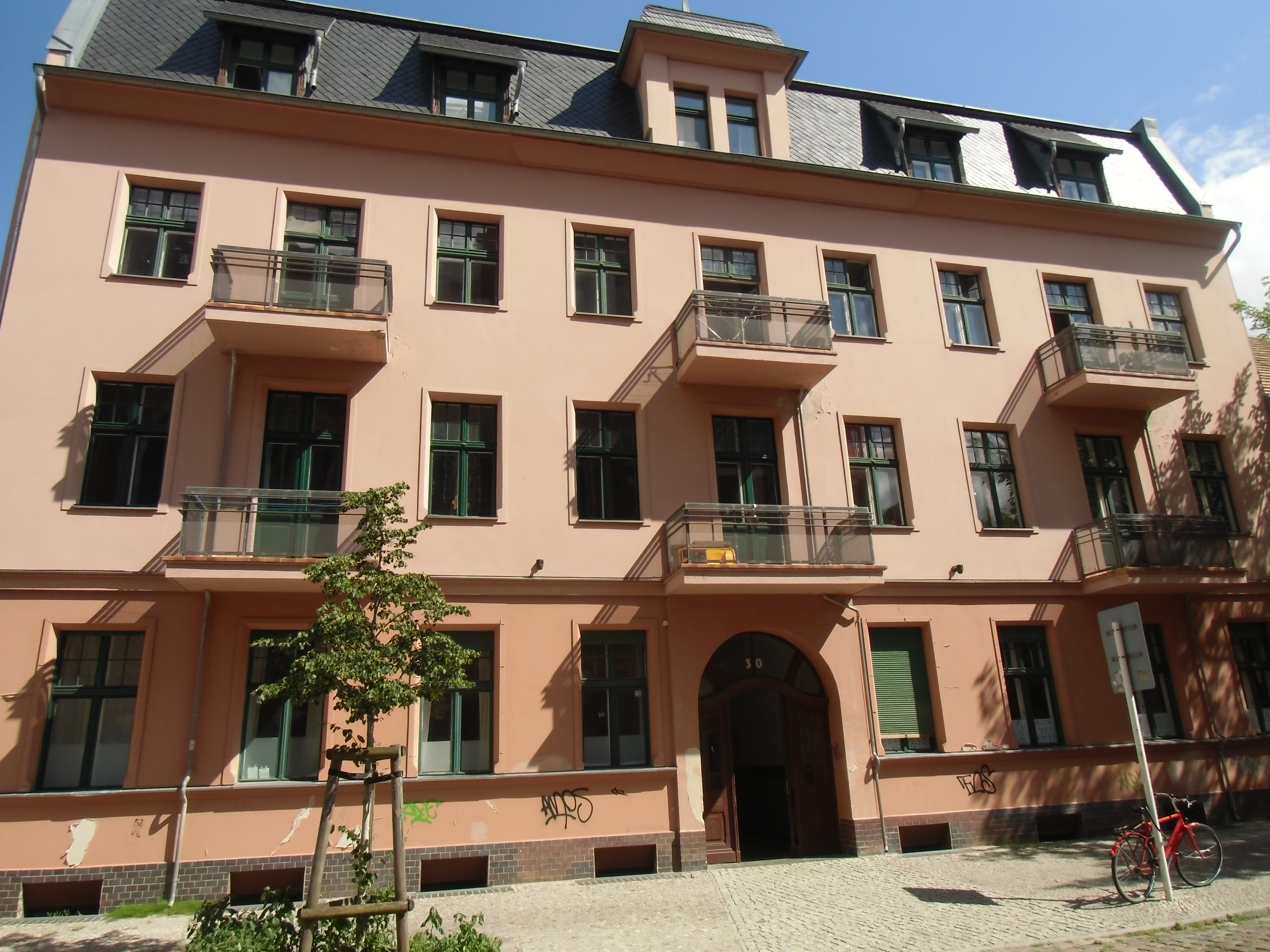 Wohnhaus im denkmalgeschützten Ensemble Bölschestraße, erbaut 1902-1903